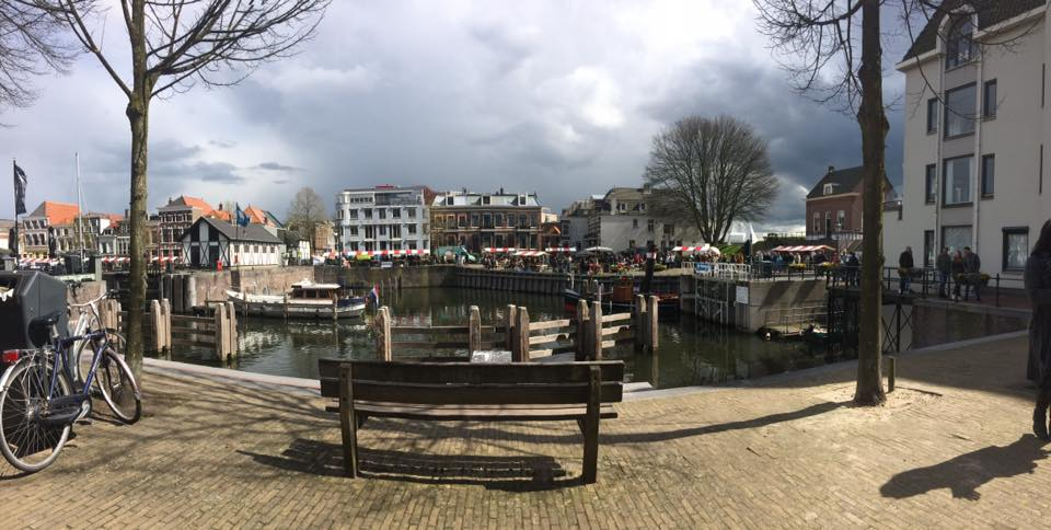 Zicht op de Lingehaven in de binnenstad van Gorinchem